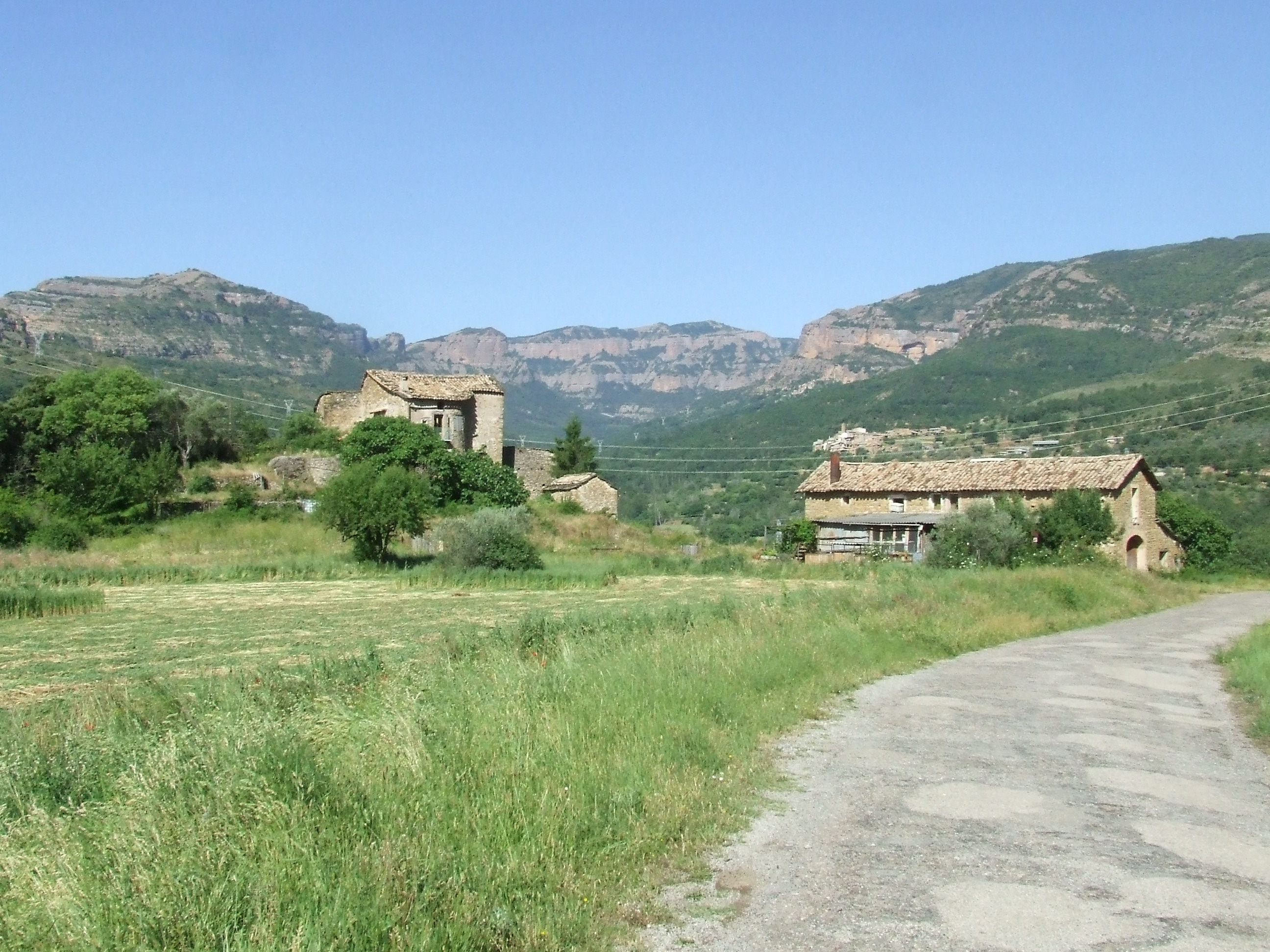 La Masia Soriguer (Erinyà, Toralla i Serradell, Conca de Dalt, Pallars Jussà)